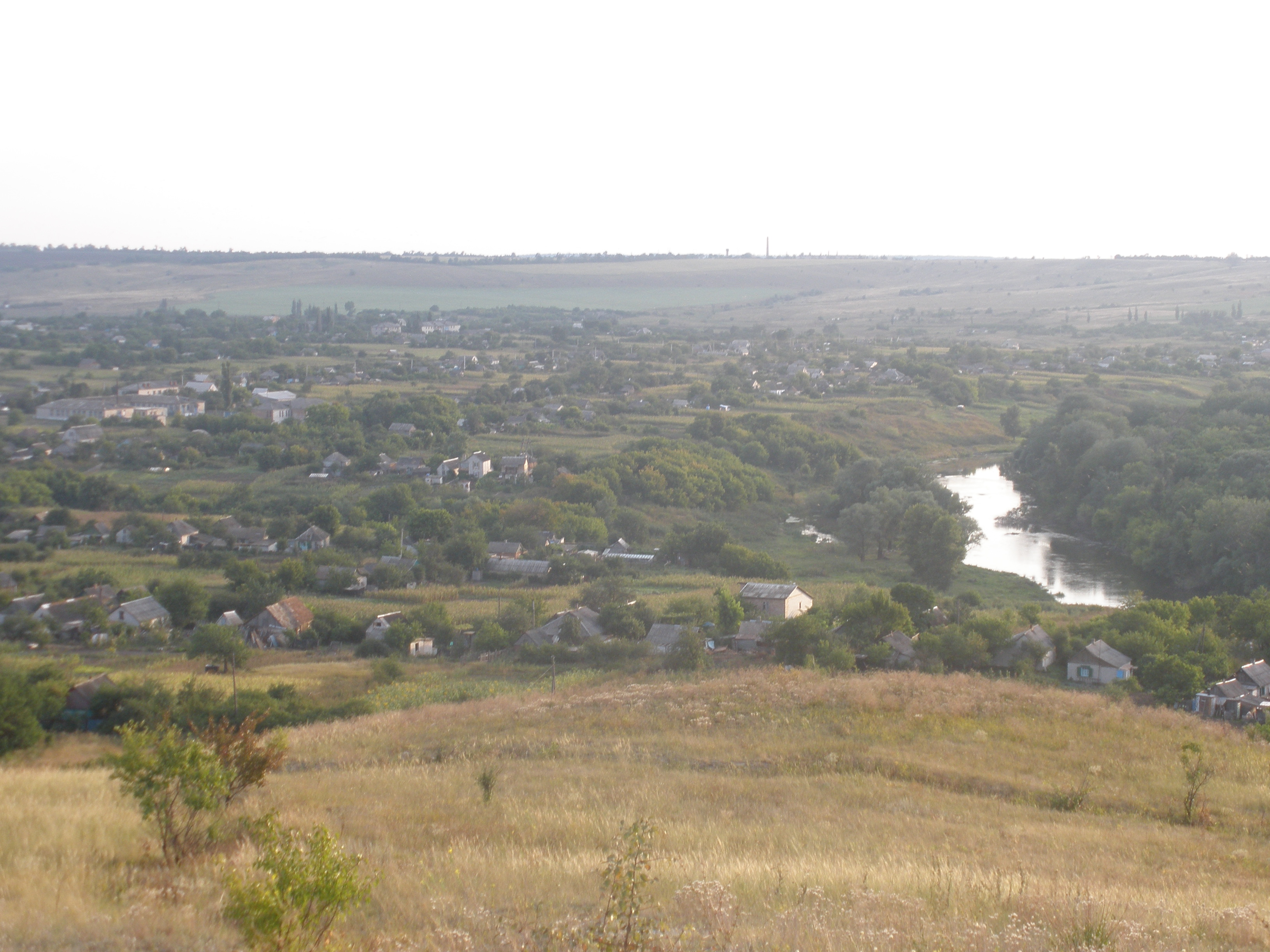 Вид на Серебрянку с Марьиной горы